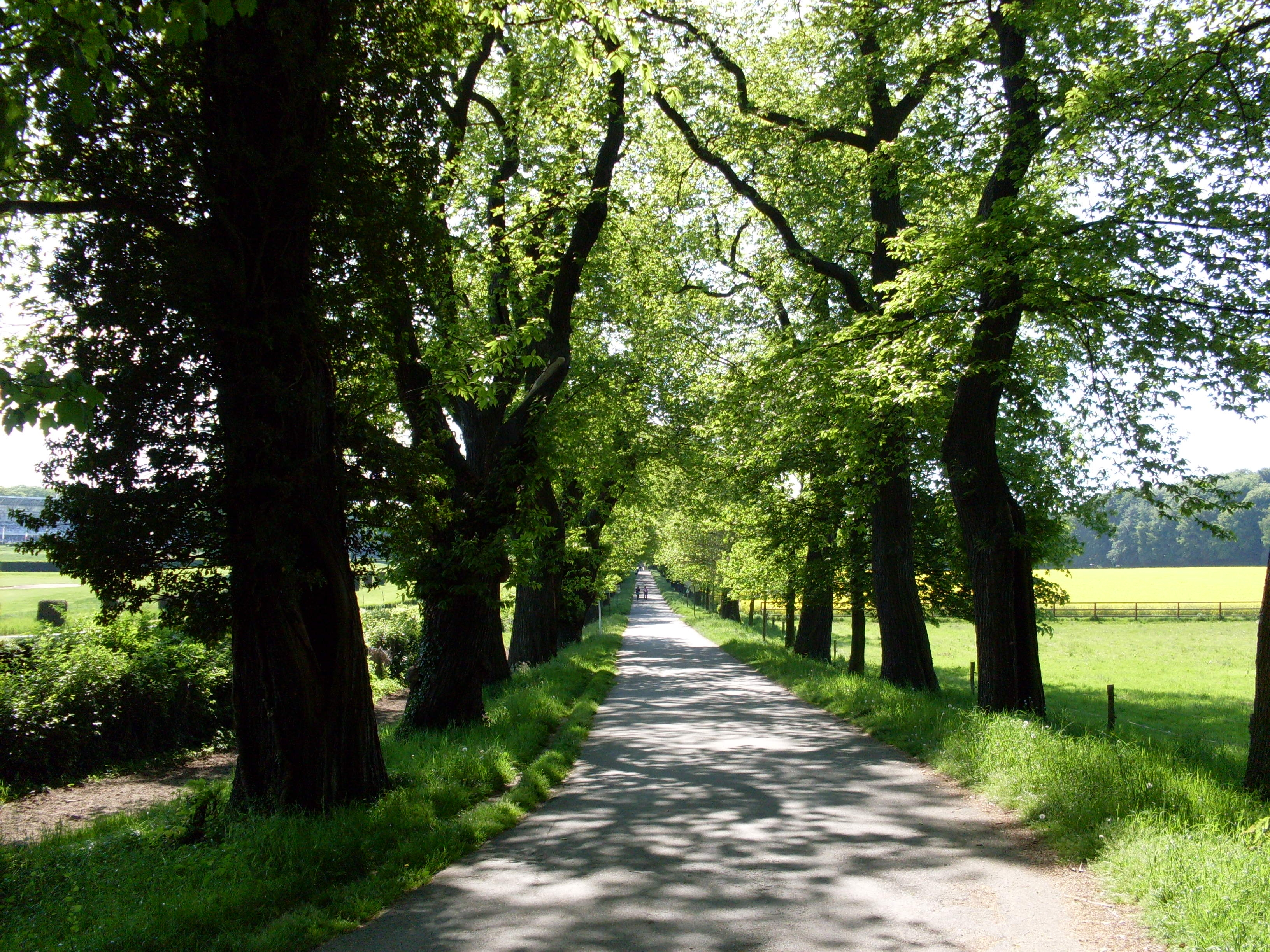 Düsseldorf-Ludenberg, Kastanienallee entlang der Galopprennbahn